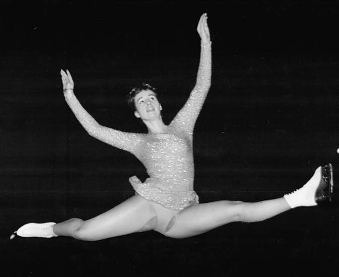 Regine Heitzer Zentralbild Kohls Sta-Krz. 18.11.1962 Eiskunstlaufveranstaltung in der Werner-Seelenbinder-Halle Ein großes Schaulaufen, an dem sich viele bekannte Eiskunstläufer und -tänzer aus der Sowjetunion, Österreich, der CSSR, Ungarn und der DDR beteiligten, fand am 18.11.62 in der Berliner Werner-Seelenbinder-Halle statt. UBz: Regine Heitzer, Zweite bei den Europameisterschaften in Genf und Dritte bei den Weltmeisterschaften 1962 in Prag.